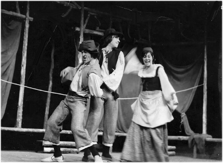 סצינה מהמחזה של מולייר: "הרופא בעל כורחו" צולם בתאטרון באר שבע 1974